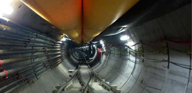 inaugurazione della Galleria Pavoncelli bis